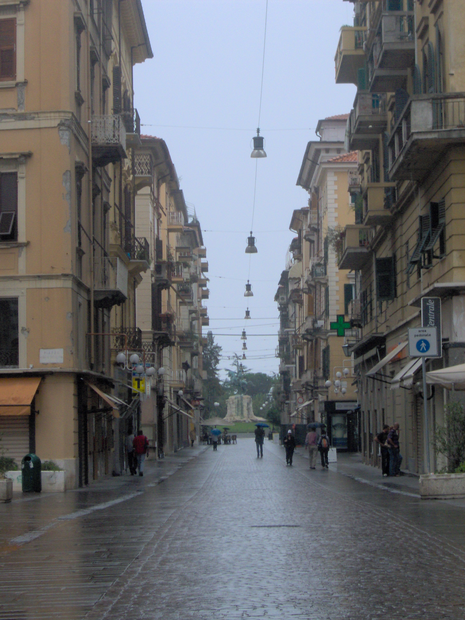 Corso Cavour in direzione dei Giardini Pubblici.